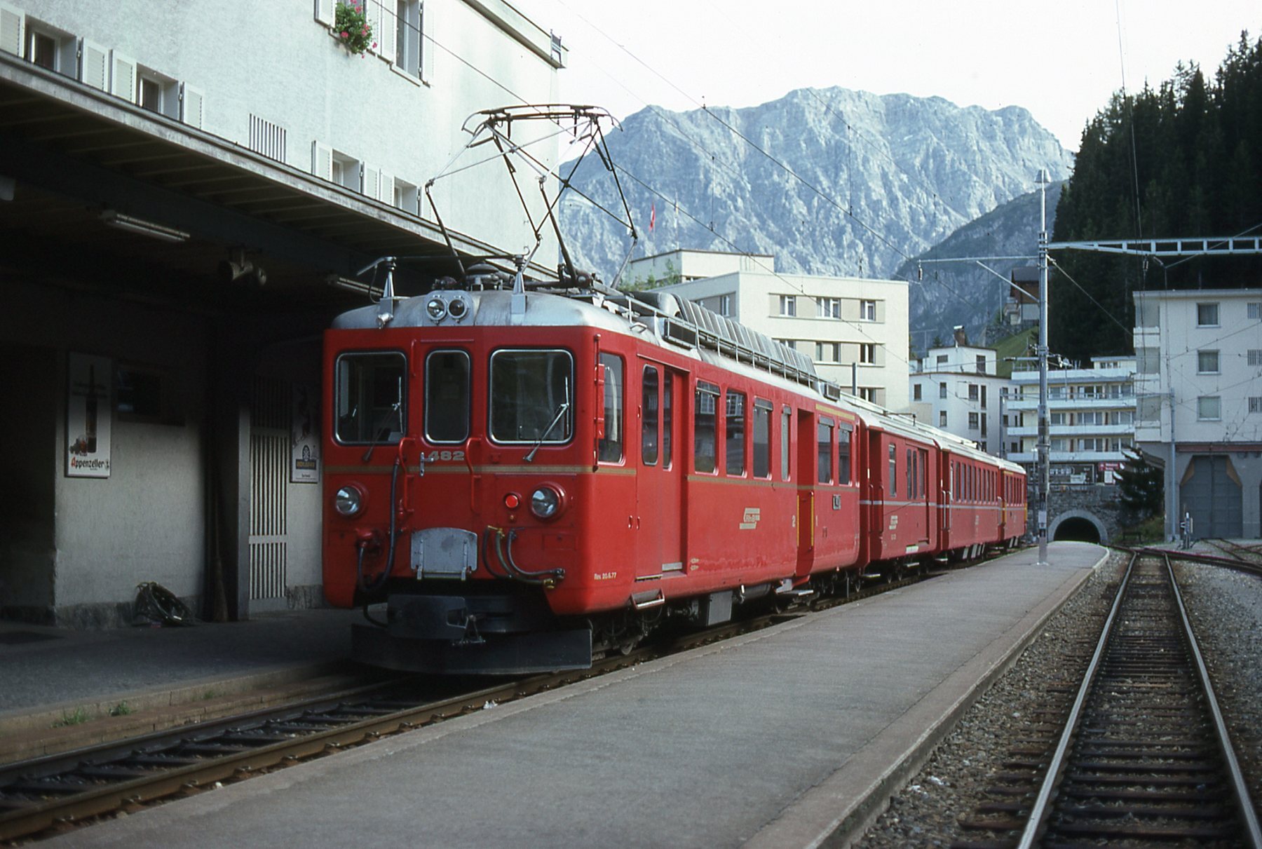 Photo prise dans les années 1980.